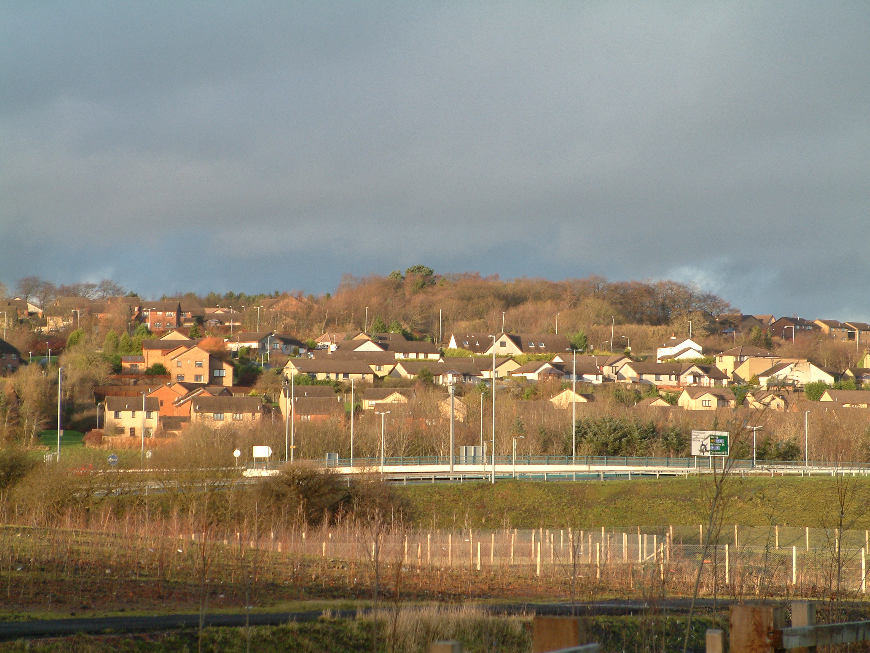 own work, StaraBlazkova, 30.12.2006